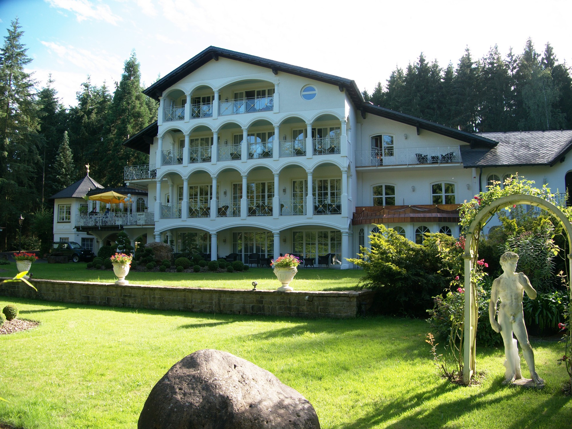 Hotel und Restaurant Sonnora in Dreis